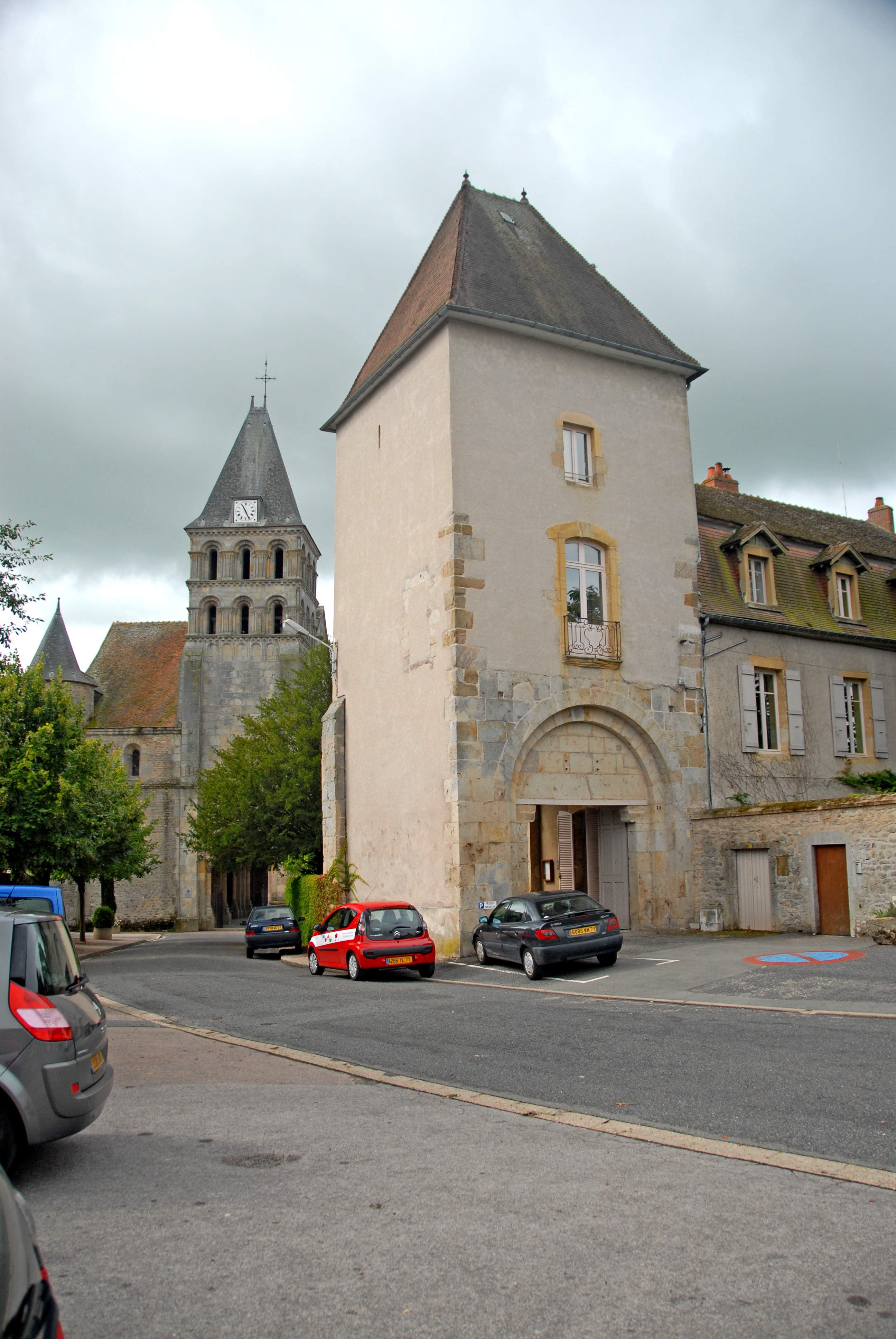 Priorat, Eingangsportalturm von W